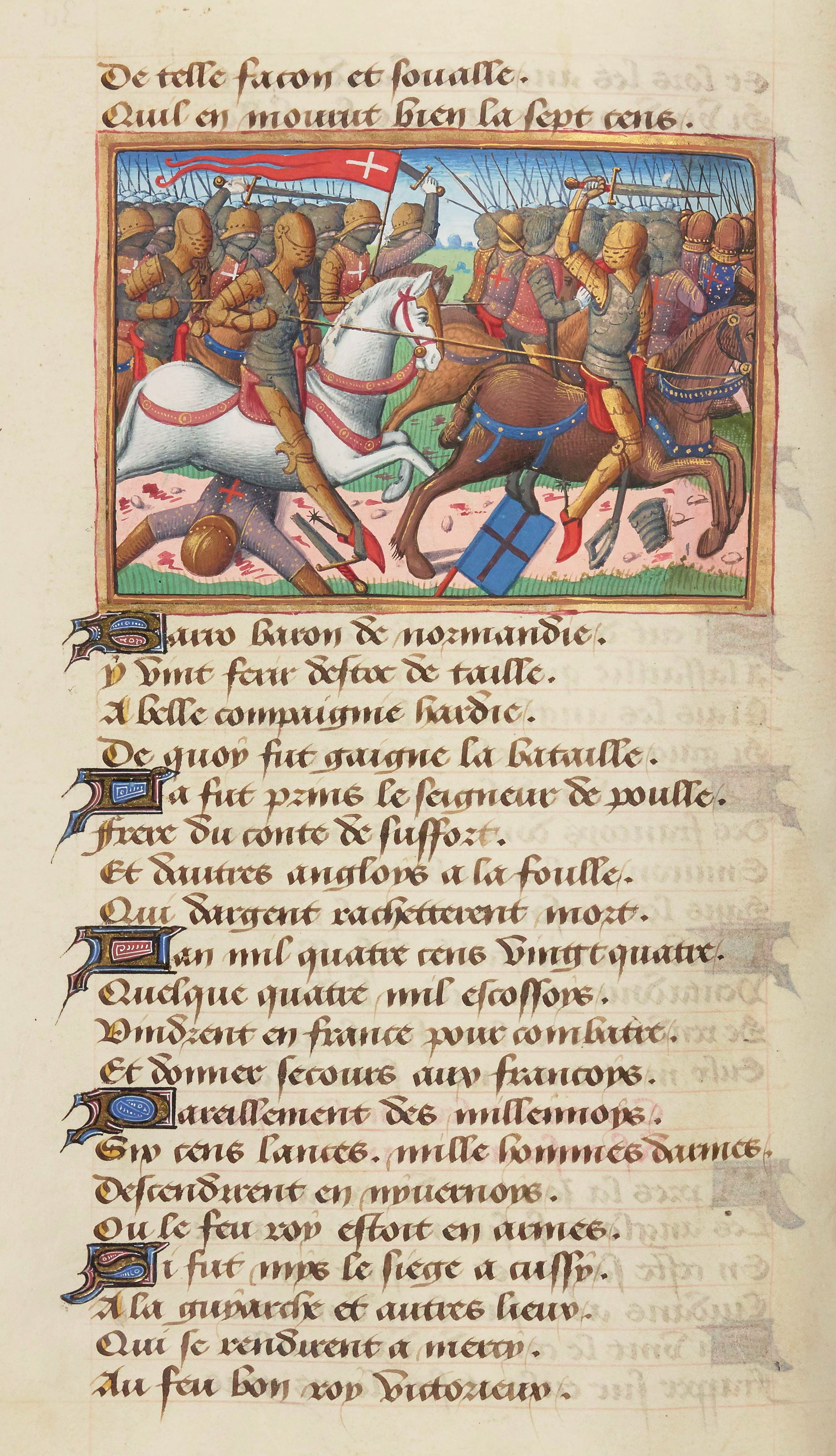 Bataille de la Brossinière (1423).